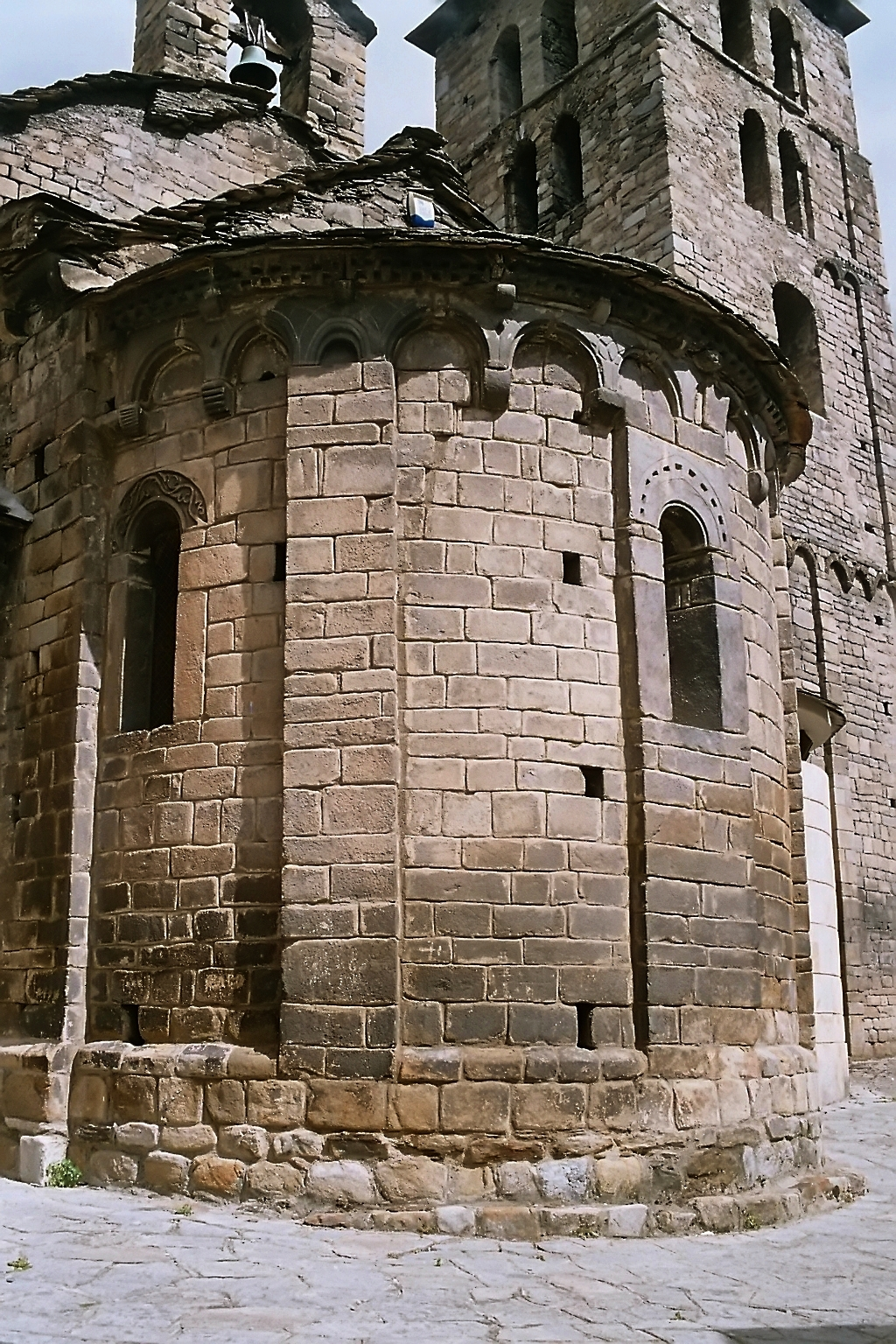 Espagne - Val d'Aran - Église de l'Assomption de Bossòst